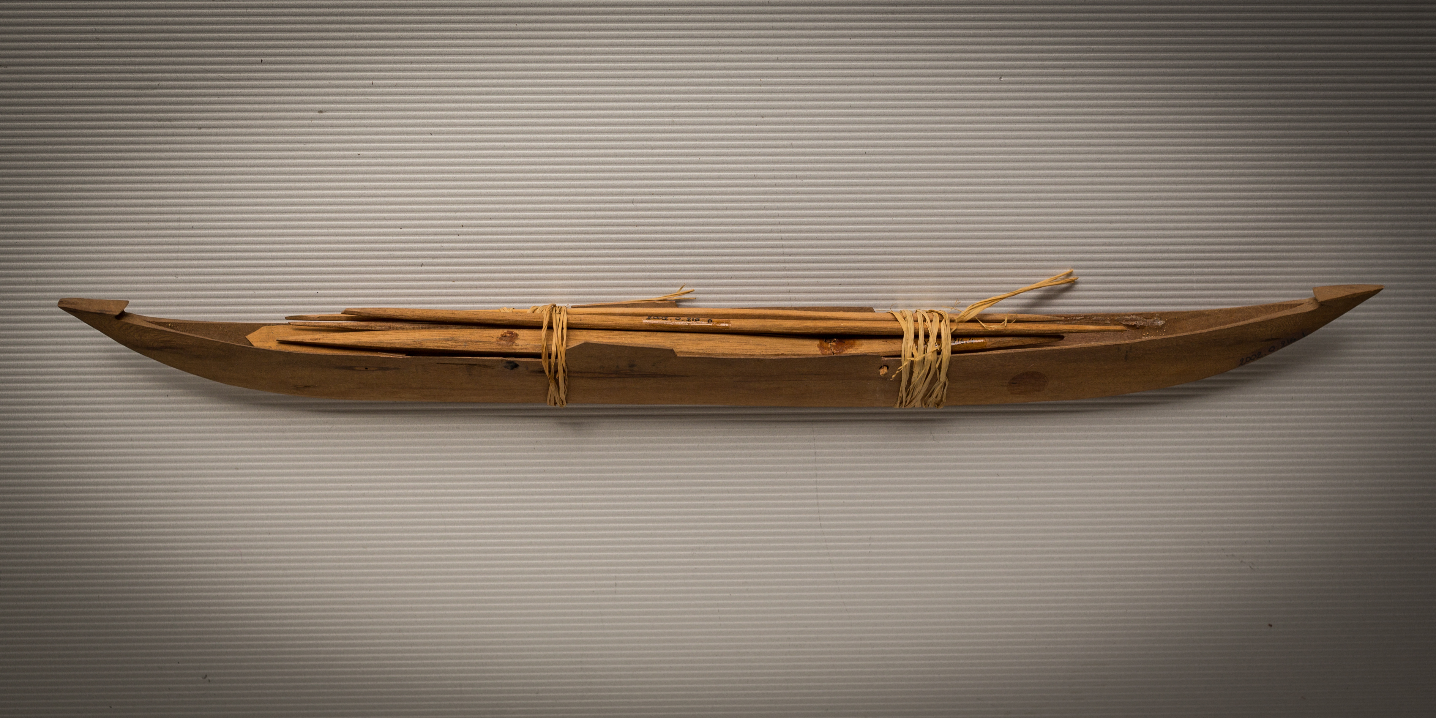 Pirogue à balancier (miniature) Provenance : Madagascar : Tuléar (Vezo) Matériaux : végétal : bois, paille Collections d'objets ethnographiques de l'université de Strasbourg (cf. fiche détaillée dans la base de données Ethno de la Maison interuniversitaire des sciences de l'homme - Alsace) N° d'inventaire : 2002.0.216